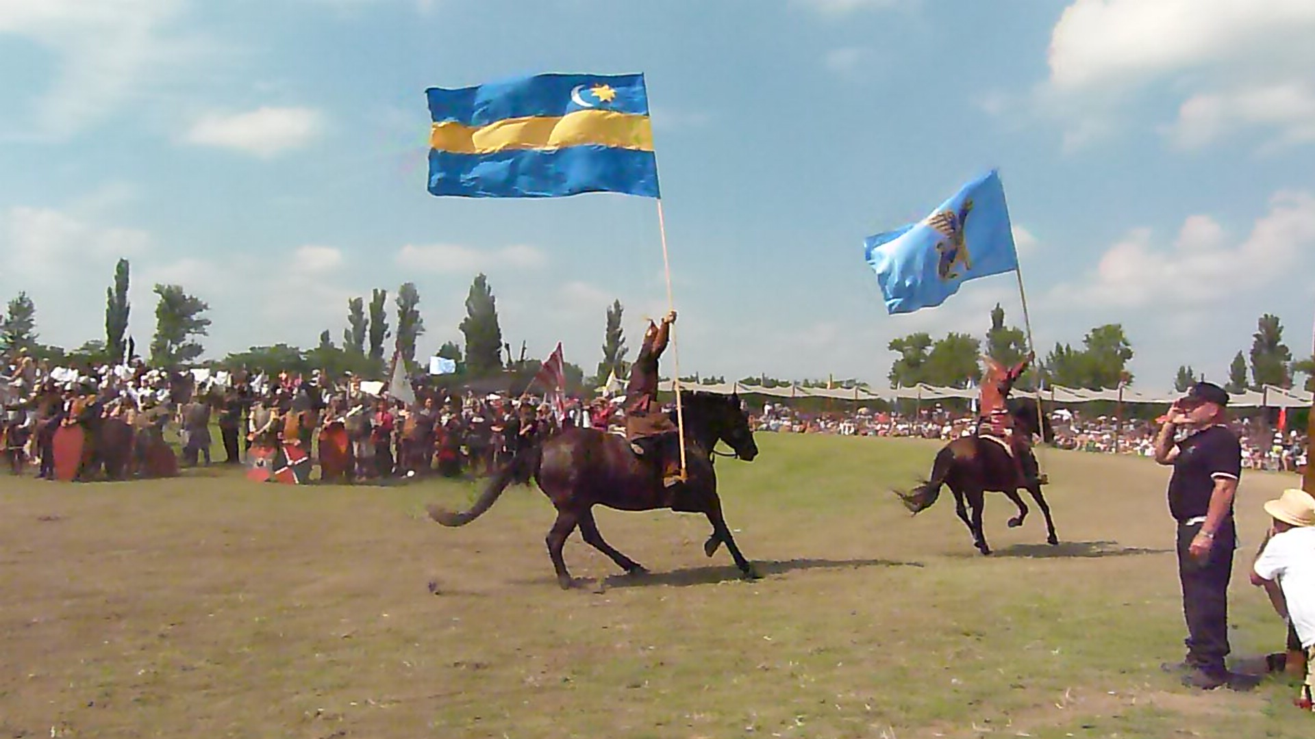 A felvétel 2014. augusztus 9-én, szombaton készült Bugacon. Kurultáj - Magyar Törzsi Gyűlés. 2006 szeptemberében Bíró András Zsolt antropológus, humánbiológus vezetésével öt fős kazak-magyar kutatócsoport több mint egy hónapos expedíció keretében járta be az észak-kazahsztáni Torgaj-vidék területét (Kosztunaj-tartomány, Dzsangeldi-megye), és a kutatás genetikai kapcsolatot mutatott ki a mai magyarság és az említett területen élő madjar törzs (ejtsd: magyar, más néven „torgaji magyarok”) között. Az eredményekről az American Journal of Physical Anthropology tudományos szakfolyóirat is beszámolt. 2006 decemberében a madjarok vezetői Bíró Andrást is meghívták első közös megbeszélésükre Kazahsztánba, ahol úgy döntöttek, hogy létrehoznak egy alapítványt és a következő évben összehívják a Kurultájt, a madjarok törzsi gyűlését. Címkék: Eurasian puszta Puszta Puszta öv Puszta belt Bíró András Zsolt Torgaj Dzsangeli megye Kurultáj Magyar Törzsi Gyűlés 2014-08-09 Magyarok Világszövetsége Magyar-Turán Alapítvány Turán népei Lezsák Sándor (2010: Bugac), (2014: Bugac) Források: Nagy-Kurultáj ©© Derzsi Elekes Andor, Budapest, 2014, You are authorised to use these photos and vids under Creative Commons – even for commercial, for profit purposes. Photos must be attributed to Derzsi Elekes Andor. All of the photos and vids in the Metapolisz DVD line are under Creative Commons and can be used even for commercial – for profit – purposes. Recommended Citation Derzsi Elekes Andor: Metapolisz DVD line